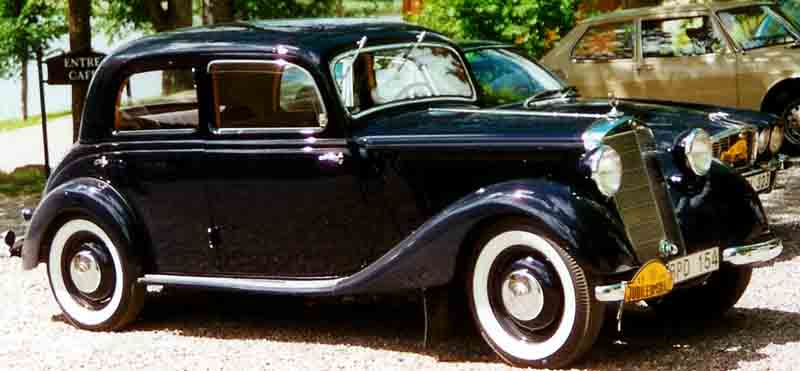 Mercedes-Benz 170DA Limousine 1951